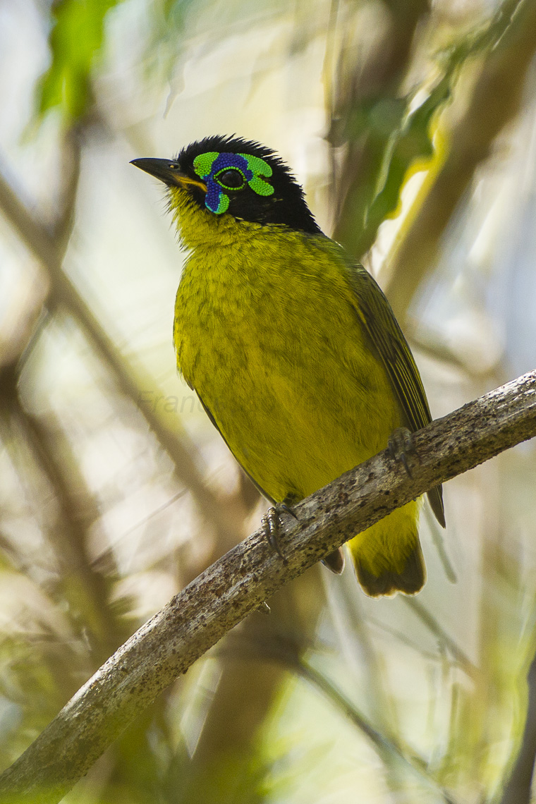 Schlegel's Asity - Ankarafantsika - Madagascar